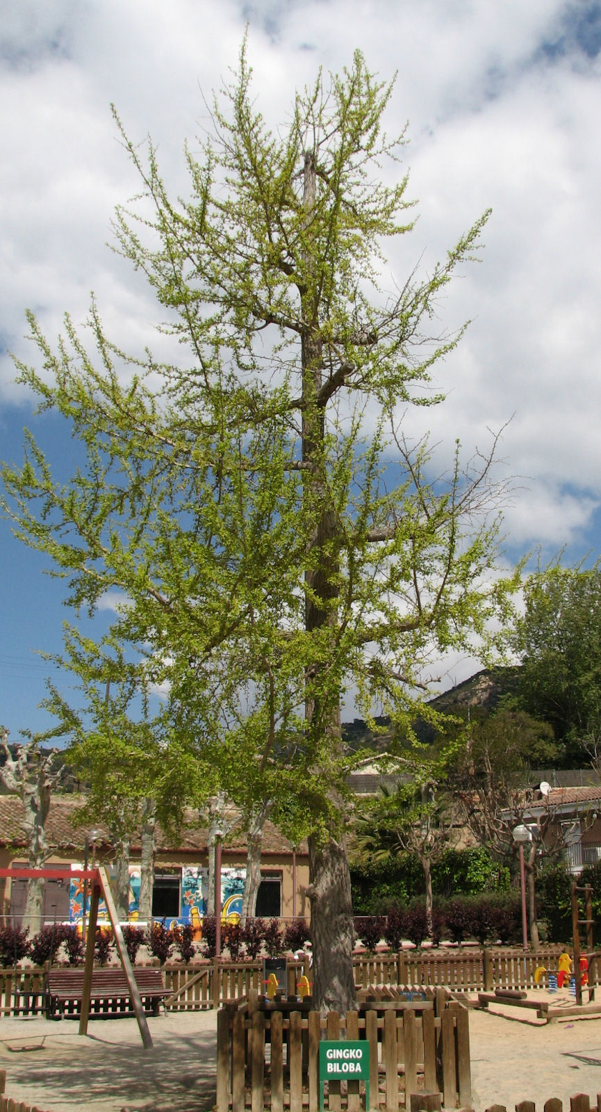 Árbol Ginkgo Biloba en Teià, Barcelona